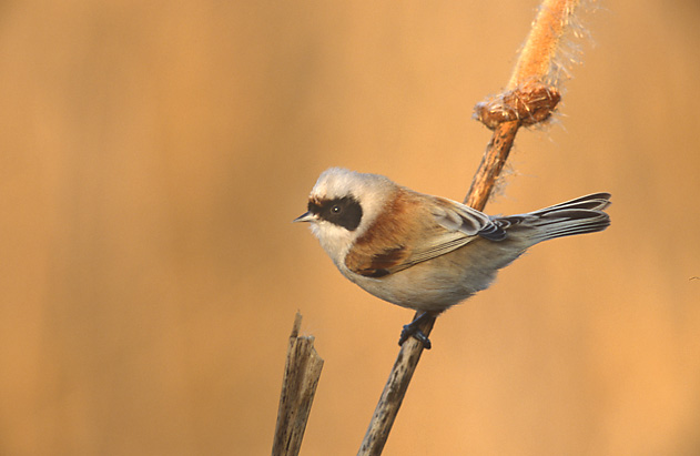 Remiz pendulinus, Poland.